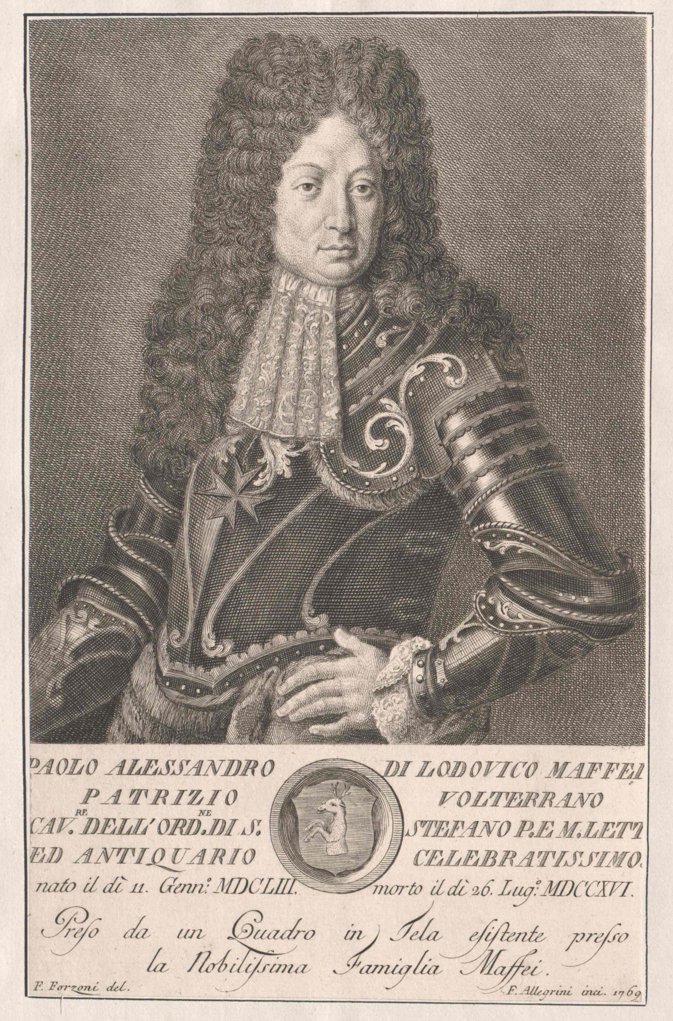 Paolo Alessandro Maffei (1653-1716); Wien, Österreichische Nationalbibliothek, Bildarchiv und Grafiksammlung, Porträtsammlung, Inventar-Nr. PORT_00107950_01